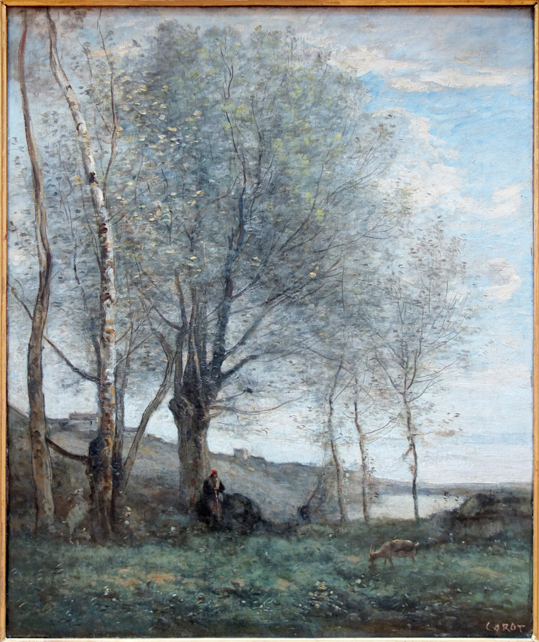 Le pâtre aux deux chèvreslabel QS:Lfr,"Le pâtre aux deux chèvres" or